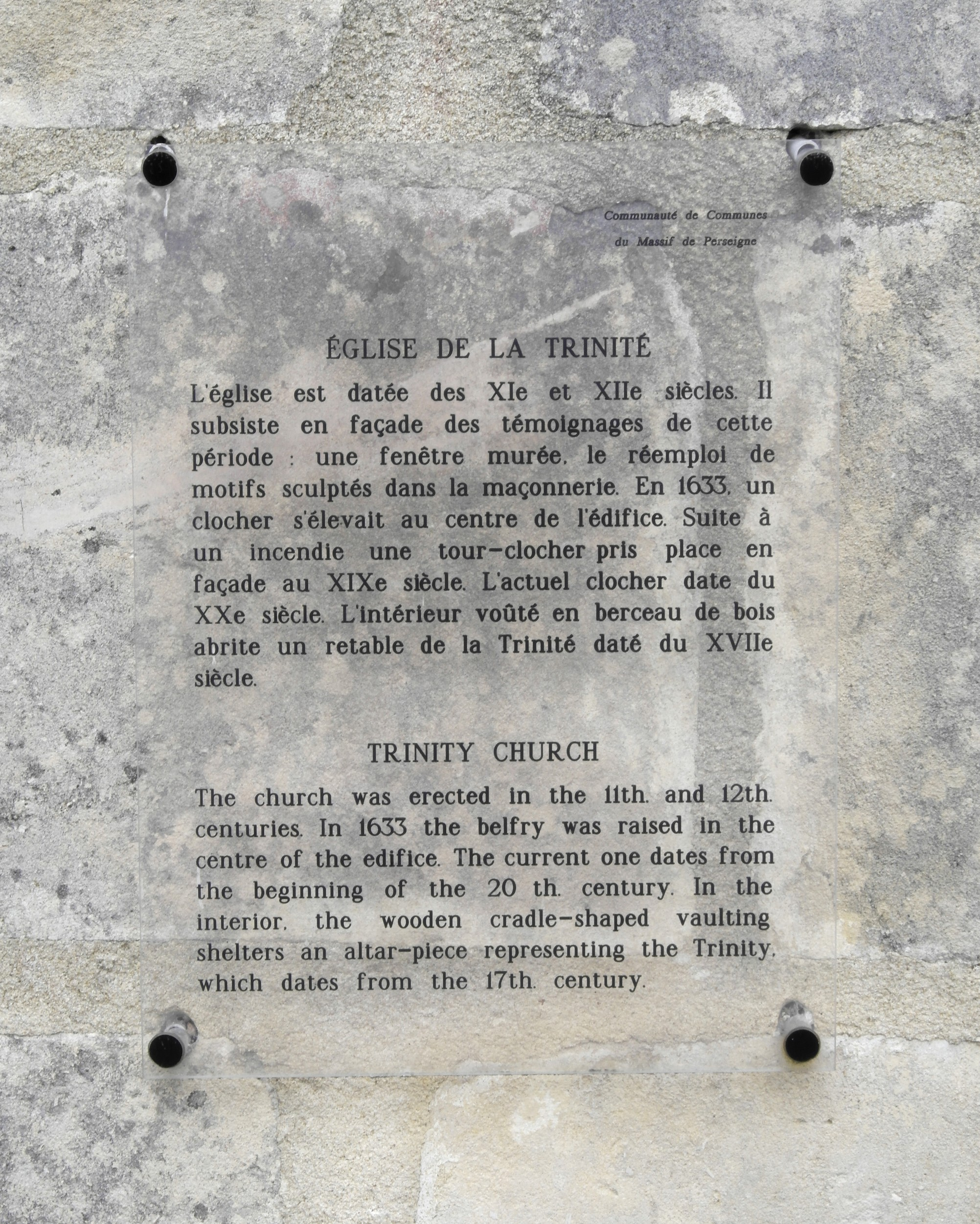 église de la Trinité, Roullée, Villeneuve-en-Perseigne, 72600, France